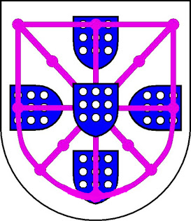 En campo de plata, con cinco escusones de Portugal antiguos de azur puestos en cruz, cada uno cargado de nueve roeles o bezantes de plata y como carbúnculo un cordón de san Francisco de púrpura, puesto en cruz, en aspa y en orla, y sobrepuesto a todos los escudetes salvo el del centro.